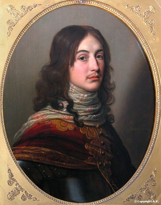 Moritz von der Pfalz